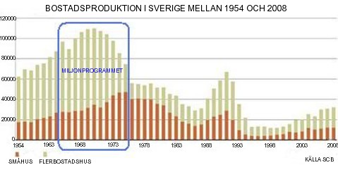 Bostadsbyggandet i Sverige från 1954 till 2008